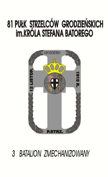 plakat 81pp